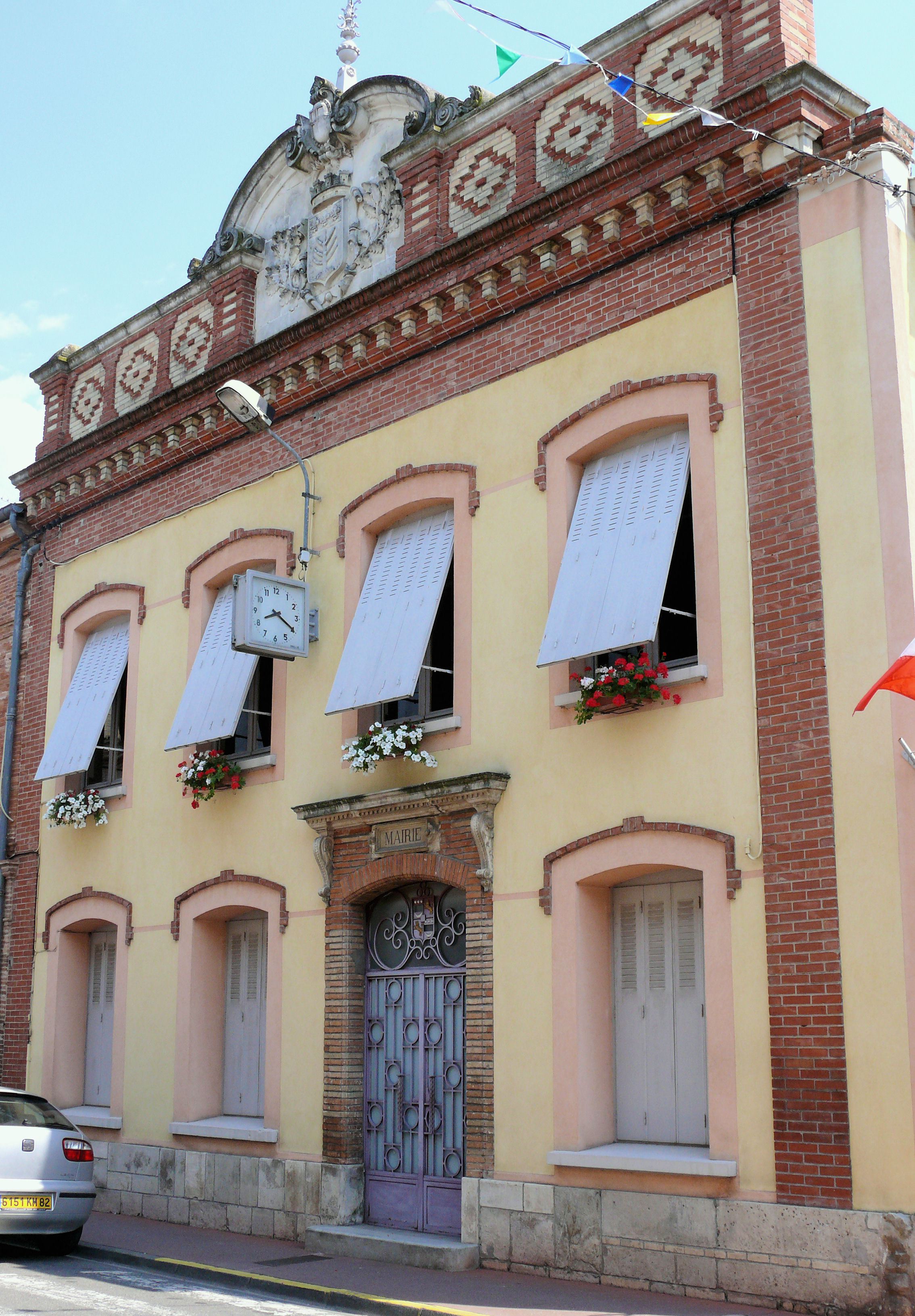 Nègrepelisse - Mairie